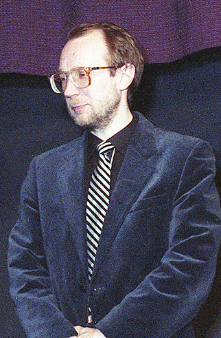 Jaan Ruus, Heiki Ernits, Janno Põldma ja Rao Heidmets 94